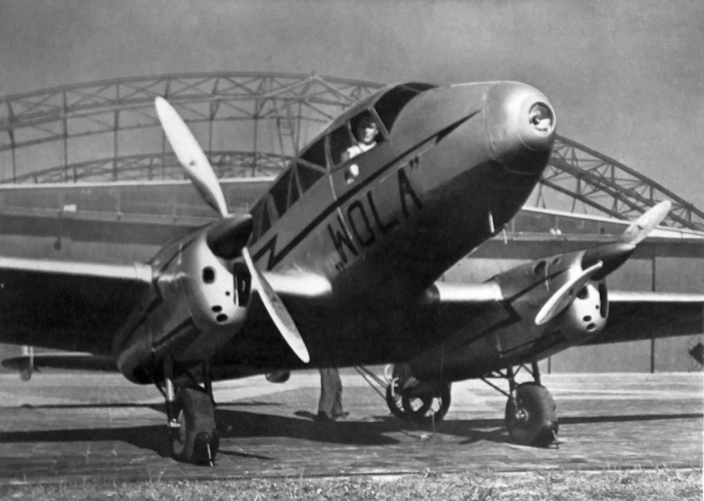 letecký motor Walter Major 6 a letoun RWD 11